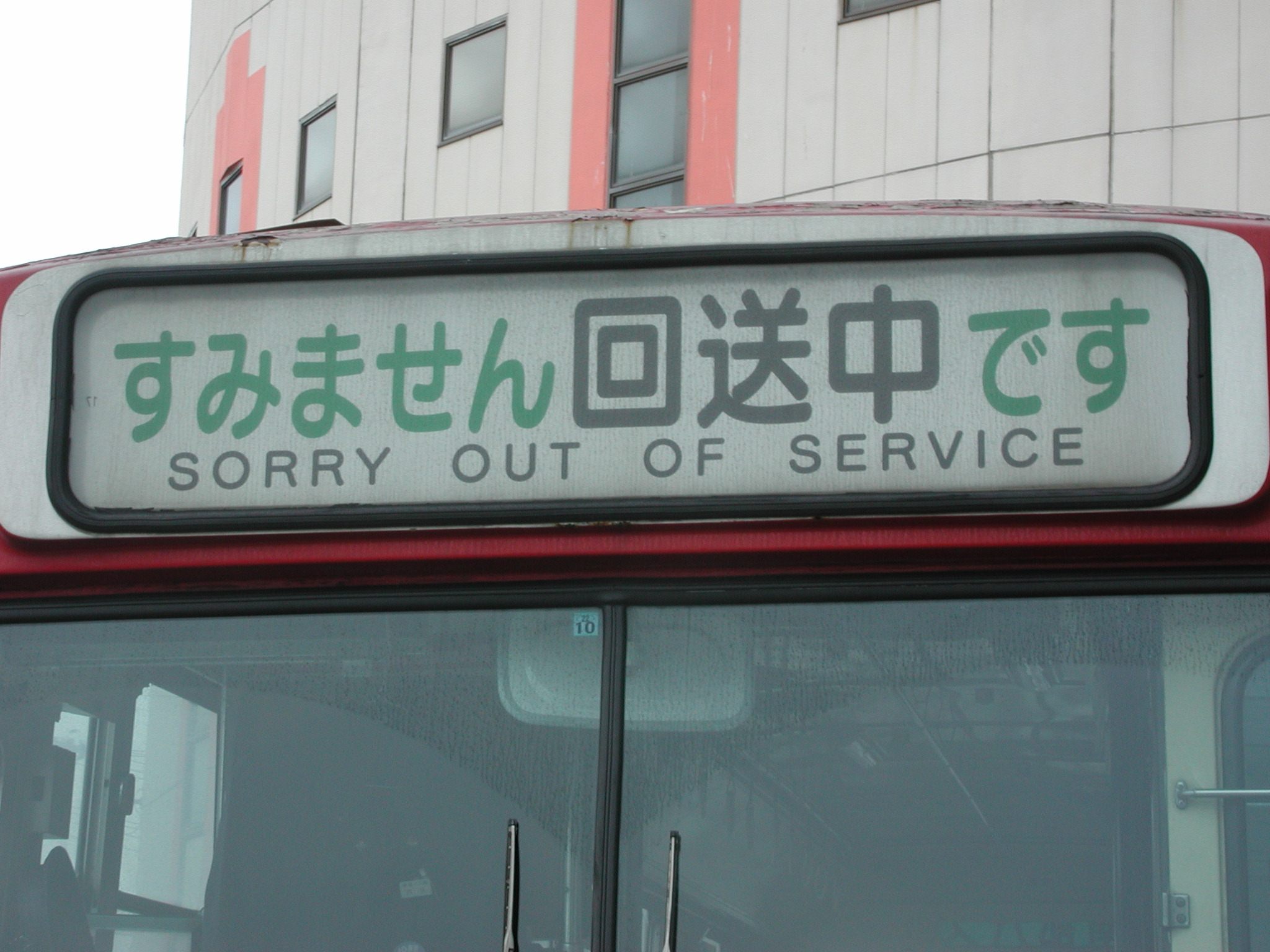 南部バス 行き先表示方向幕（白幕式）『すみません回送中です』（正面）